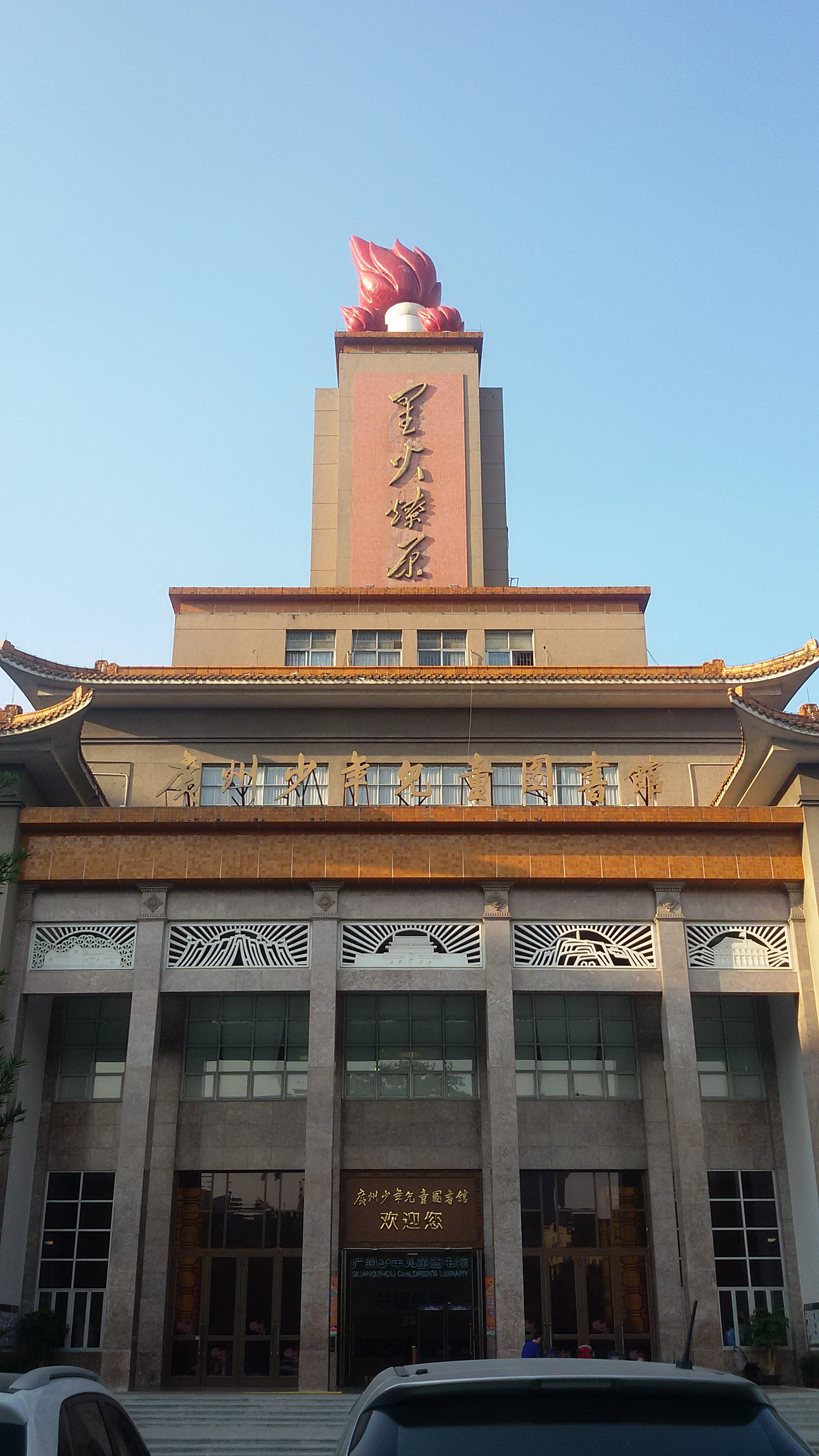 粵語: 廣州少年兒童圖書館（中山四路總館）